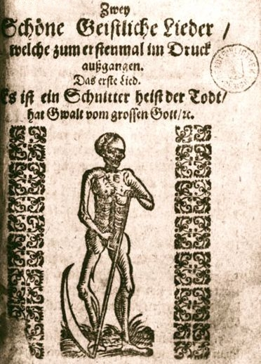 Liederbuch / Zwei Schöne Geistliche Lieder / welche zum erstenmal in Druck außgangen. Das erste Lied. Es ist ein Schnitter heist der Todt / hat Gwalt vom grossen Gott. Melodey zu singen. Getruckt zu Augspur[g]. Johann Schultes [um 1660]. DVA: Bl 124 [Kopie; Original: Zentralbibliothek Zürich, Sign.: 18.2020. (10)]